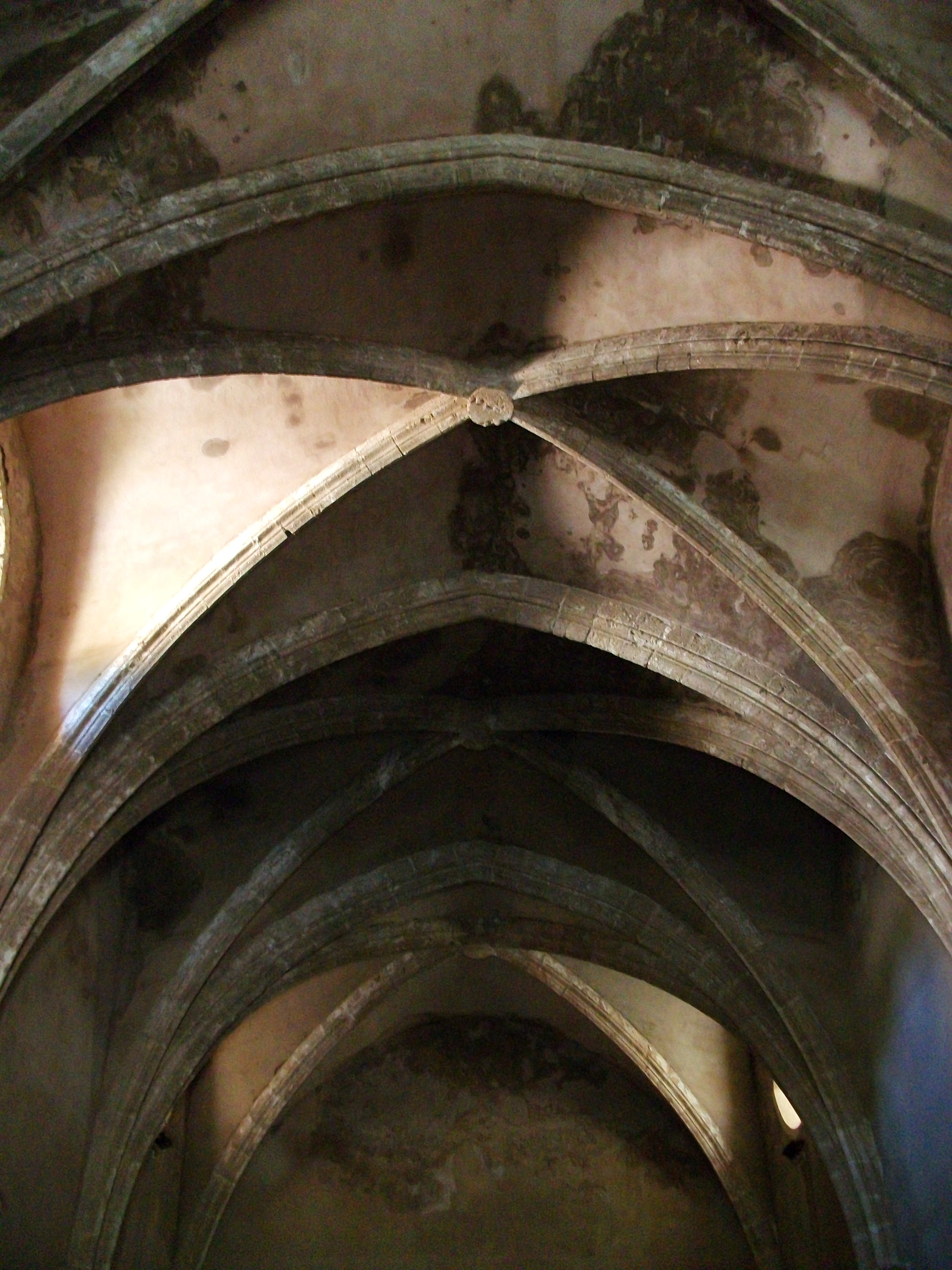 Voltes gòtiques de la capella superior de Sant Martí a la cartoixa de Valldecrist.